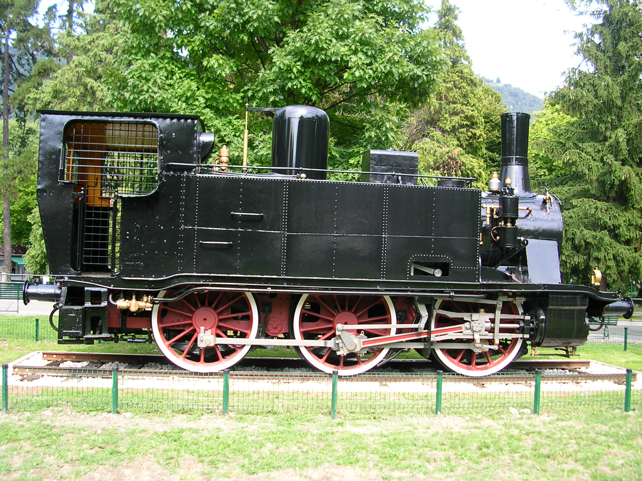 Fotografia scattata da Stefano Ripamonti presso i giardini pubblici di Como, Agosto 2006.